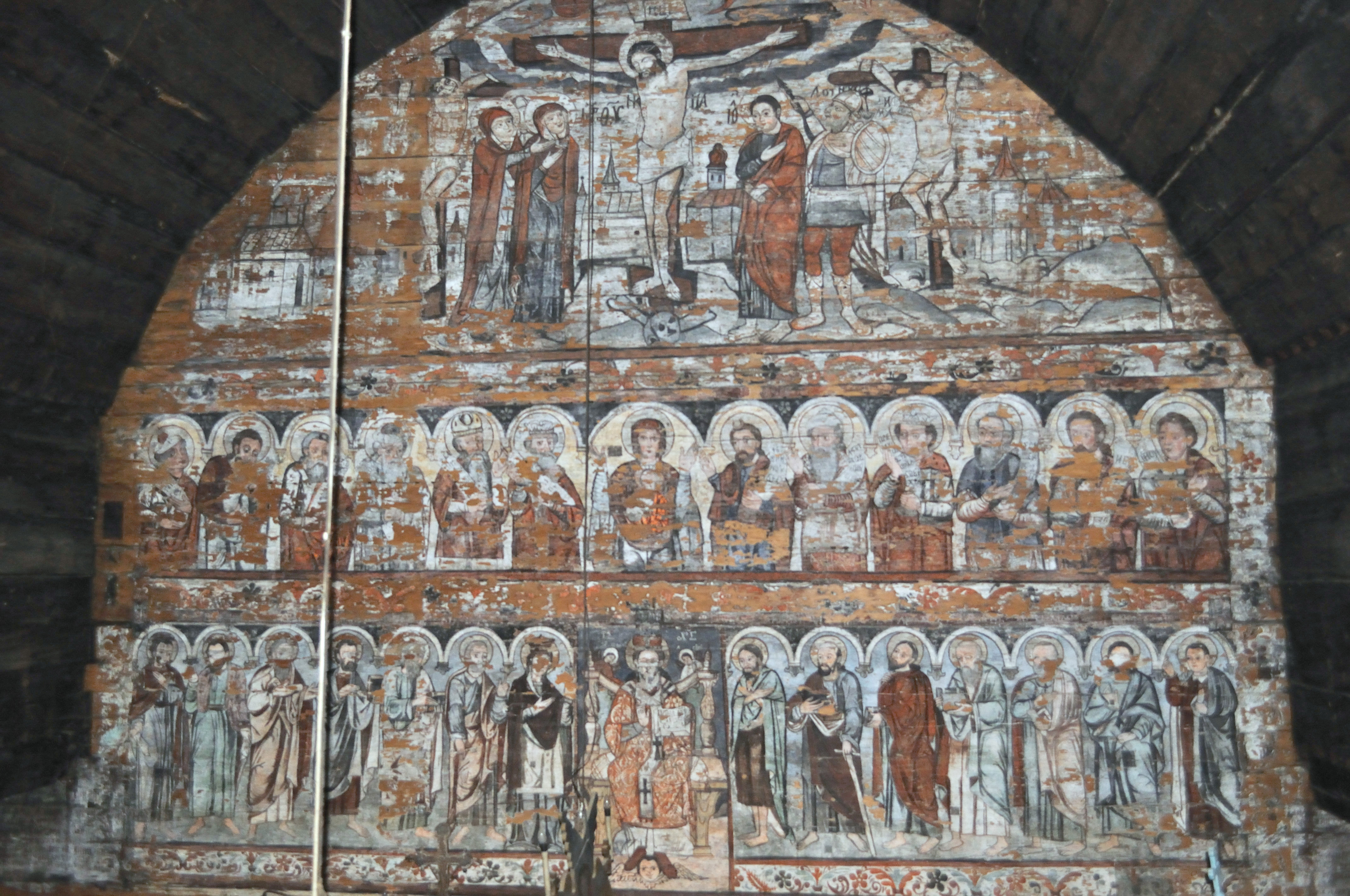 Biserica de lemn din Budești-Josani, județul Maramureș